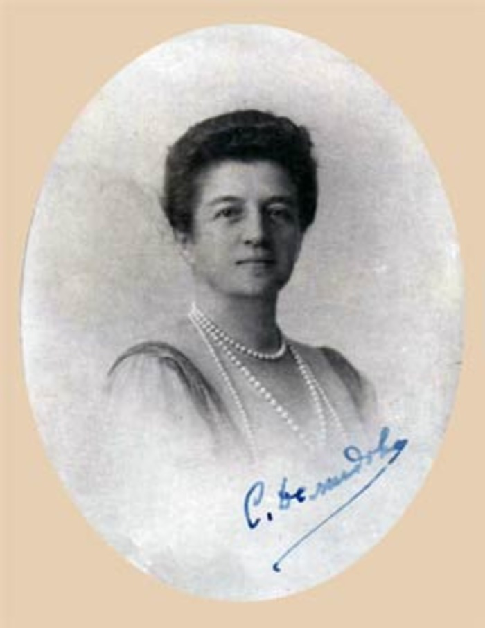 Софья Илларионовна Демидова ,урожденная Воронцова-Дашкова